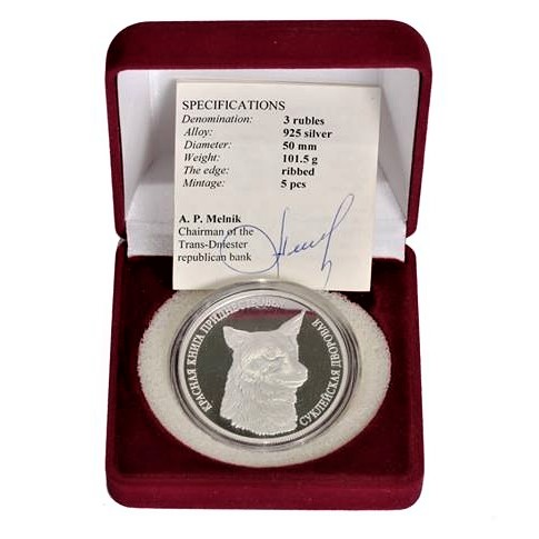 Самая редкая памятная монета Приднестровья